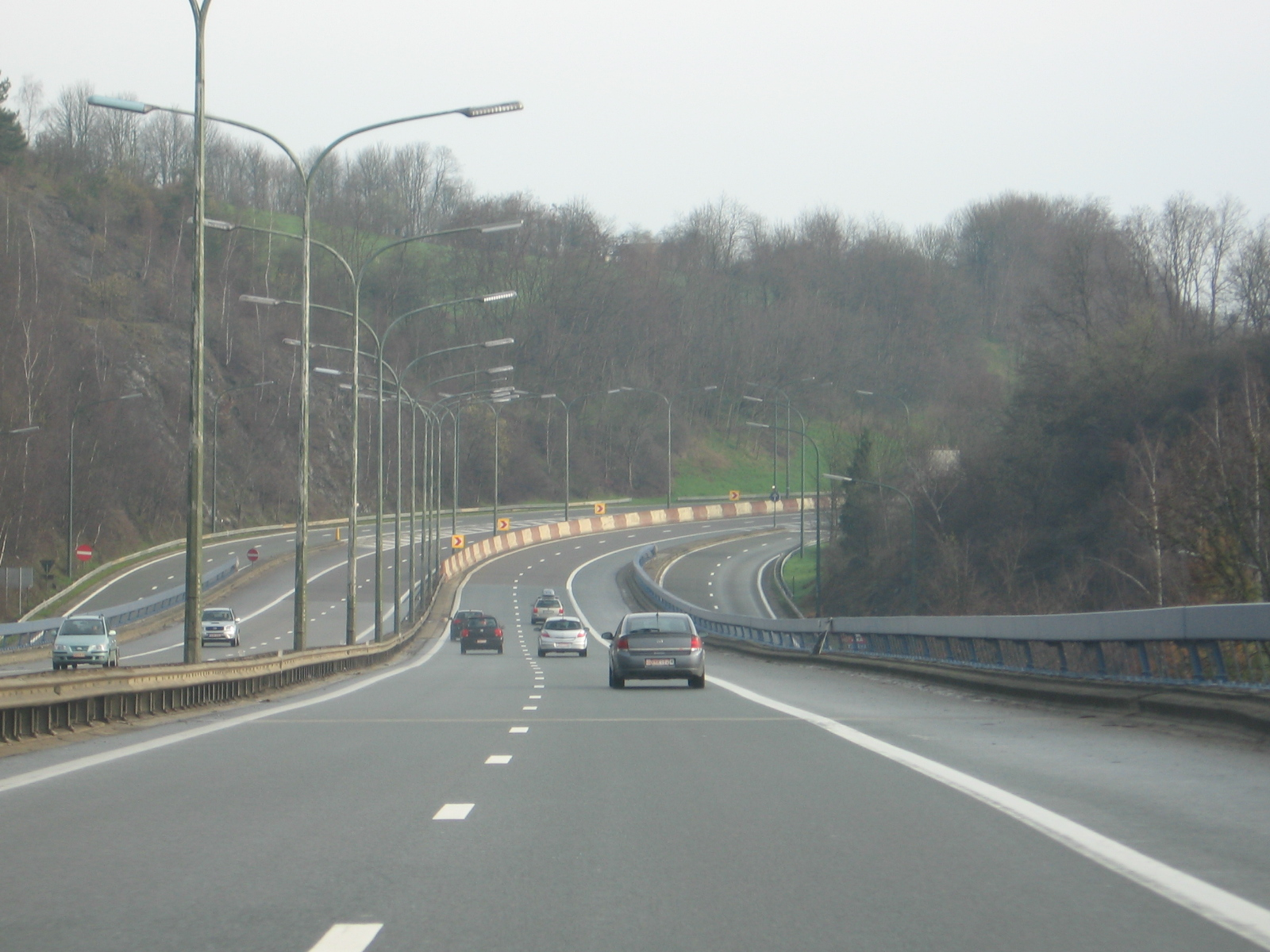 A27 near Verviers